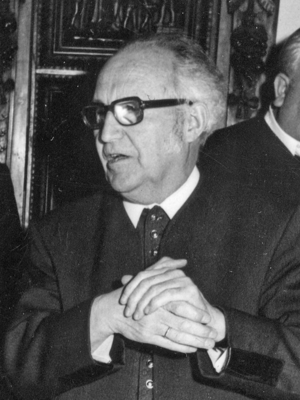 Walter Braun 1975 bei Erhalt des goldenen Ehrenringes der Stadt Memmingen